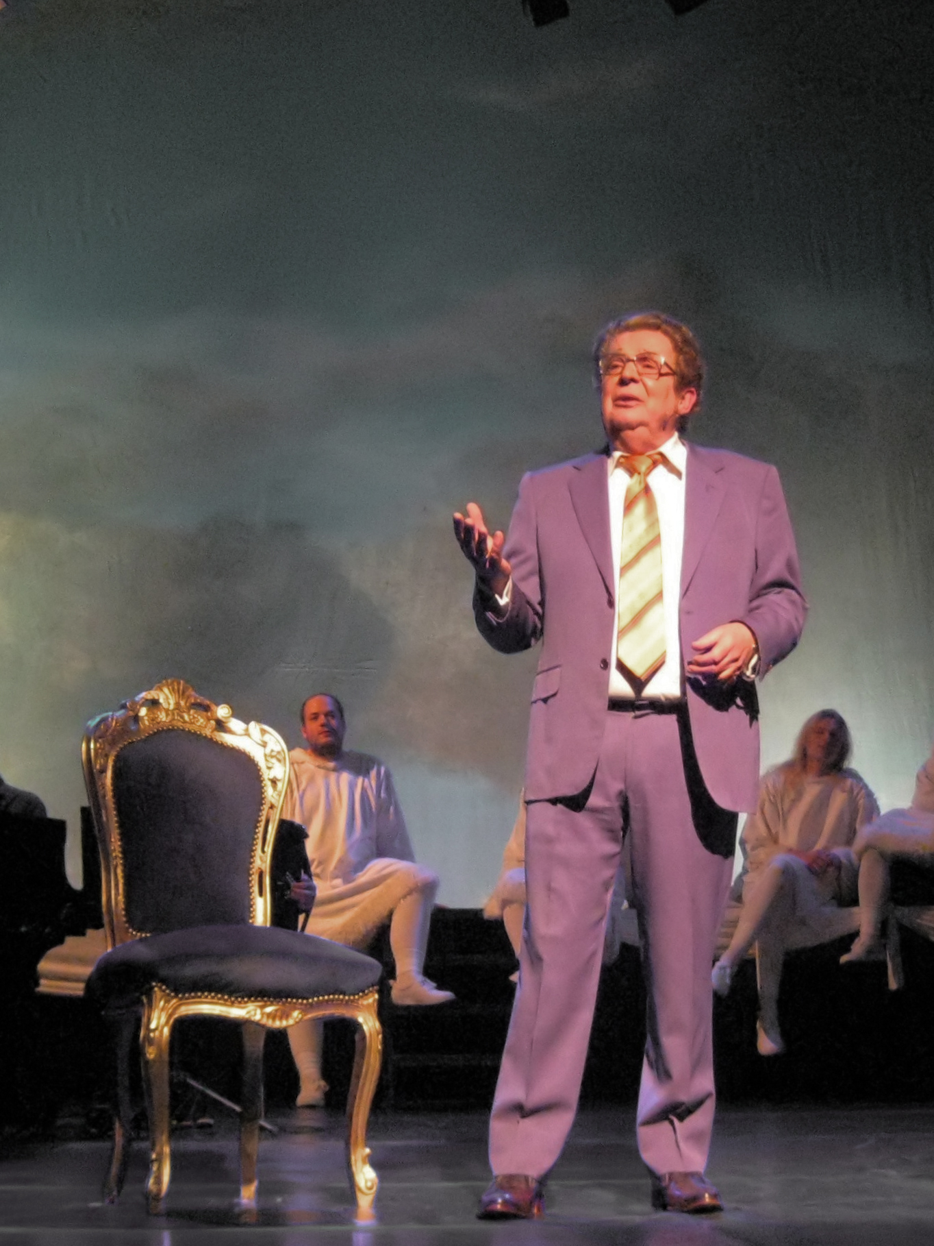 Rob van de Meeberg als Johnny Jordaan in Kerstfeest in de Jordaan in Theater Het Zonnehuis in Amsterdam. December 2016